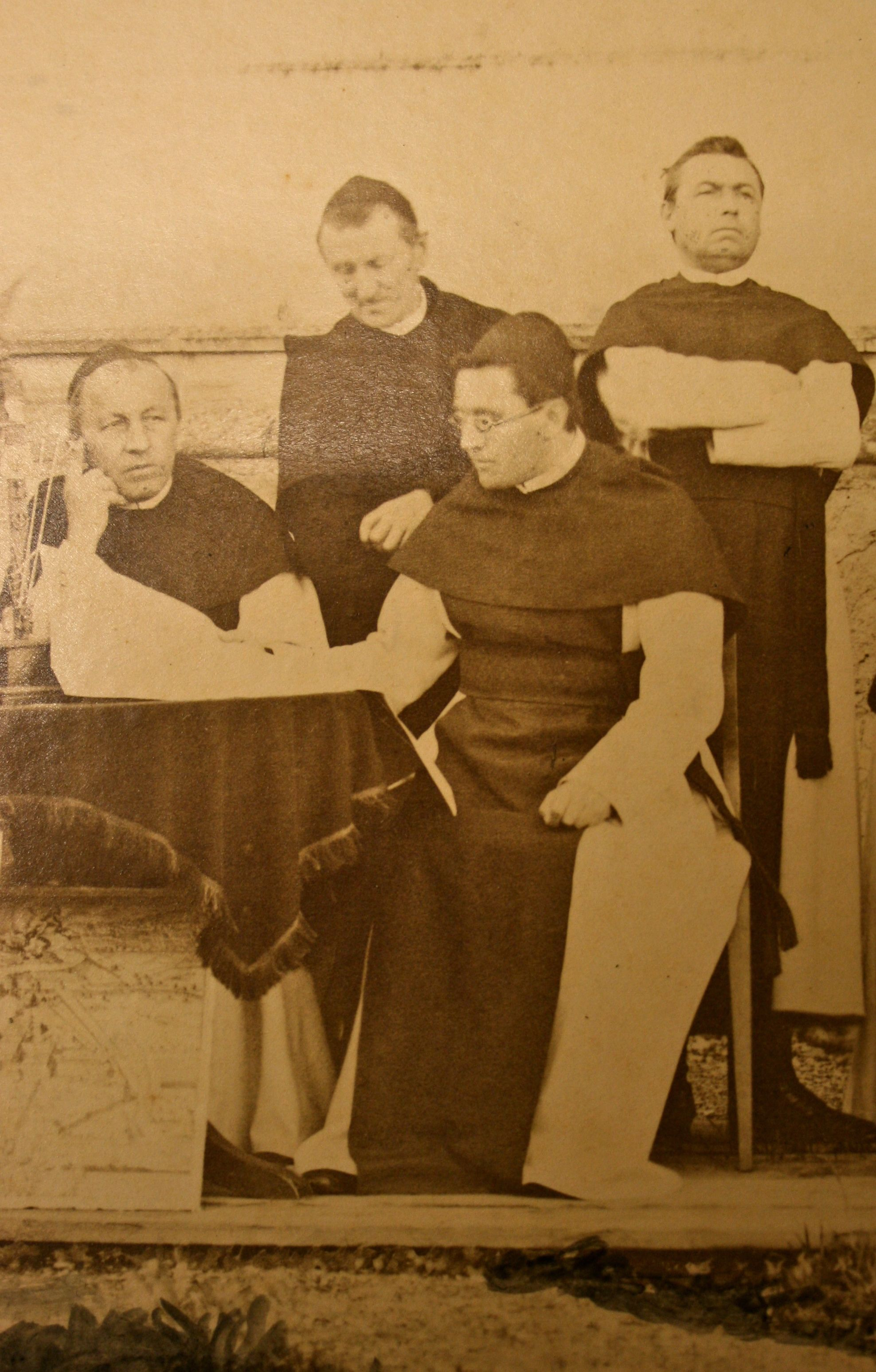 Dominikus Willi war der Bischof von Limburg. Siehe deutsche Wiki. Auf diesem Photo ist er als junger Mönch noch in der Territorialabtei Wettingen-Mehrerau. Von dort aus ging er nach Marienstatt, wo er Abt wurde. Danach wurde er Bischof.